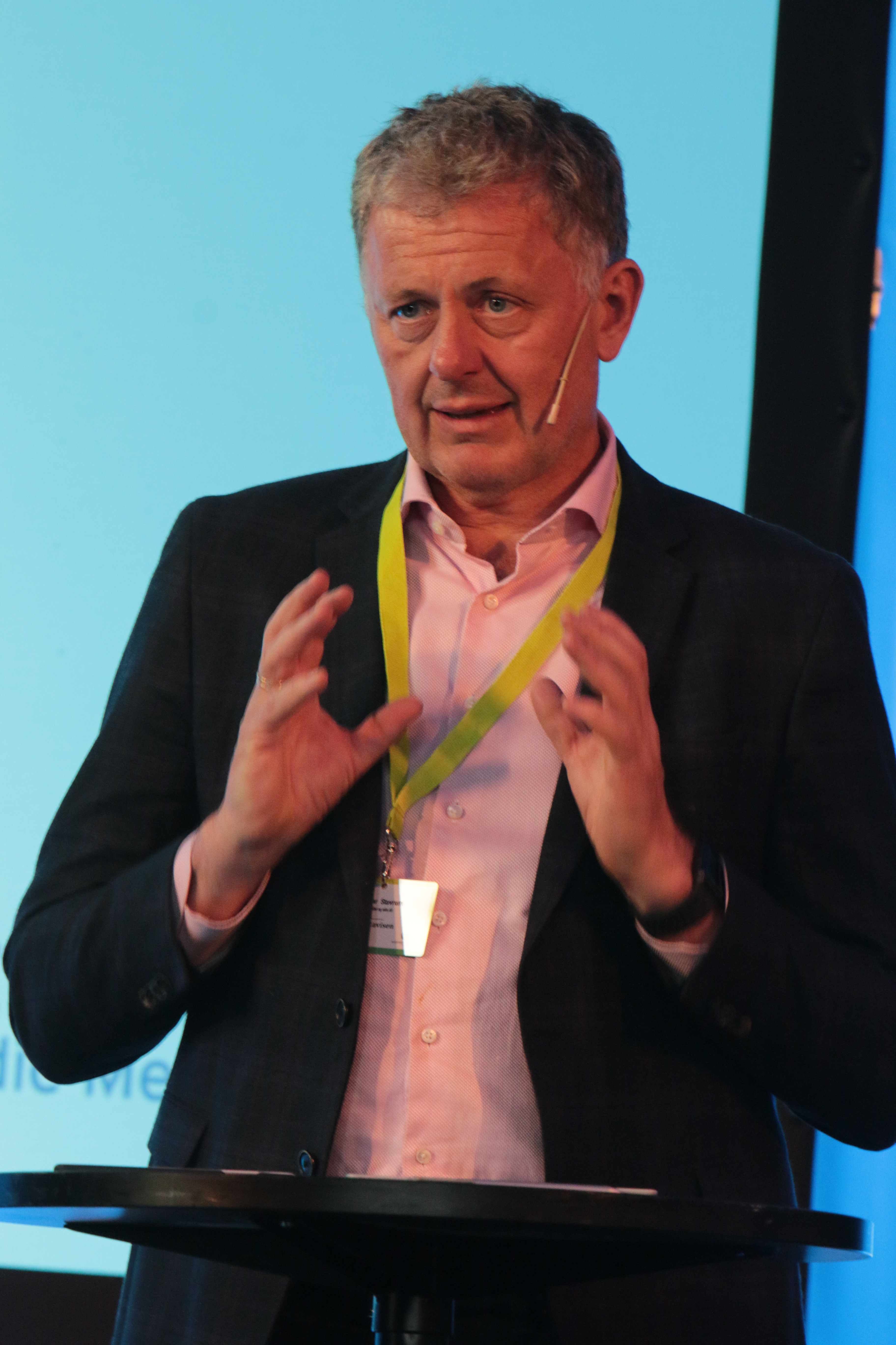 Medvirkende: Gunnar Stavrum fra Nettavisen